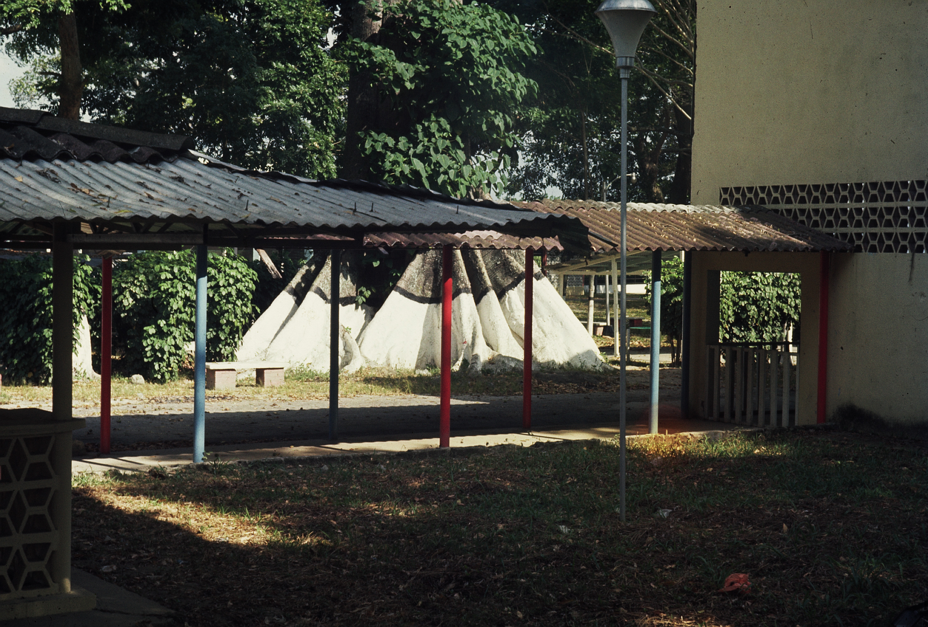 Algunos árboles de la zona intertropical presentan grandes contrafuertes en la base del tronco para reforzar el sostén que requiere su corpulencia y la poca profundidad de los suelos. Parque en San Felipe, estado Yaracuy, Venezuela. Contrafuertes del tronco de un árbol corpulento en un parque de San Felipe, Yaracuy, Venezuela. Contrafuertes típicos de un árbol corpulento de la zona intertropical. La comparación con un banco en el parque da idea de su tamaño. San Felipe, Estado Yaracuy, Venezuela. Los árboles más corpulentos de la zona intertropical suelen tener gruesos contrafuertes para sostener su enorme masa. Ello se debe a que los suelos en la zona intertropical son muy someros, no debido a su pobreza en nutrientes, sino a las intensas lluvias, que van disolviendo y "lavando" las materias vegetales en descomposición, lo que genera este tipo de adaptación de las raíces para aprovechar mejor esos nutrientes.